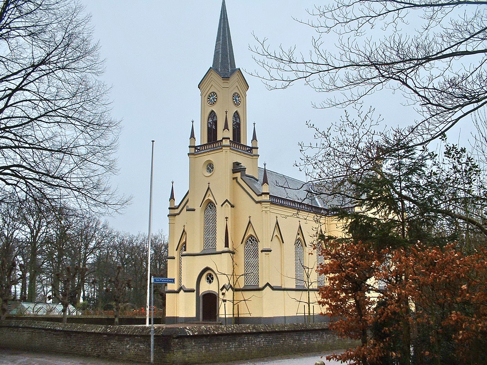 Church Neerijnen